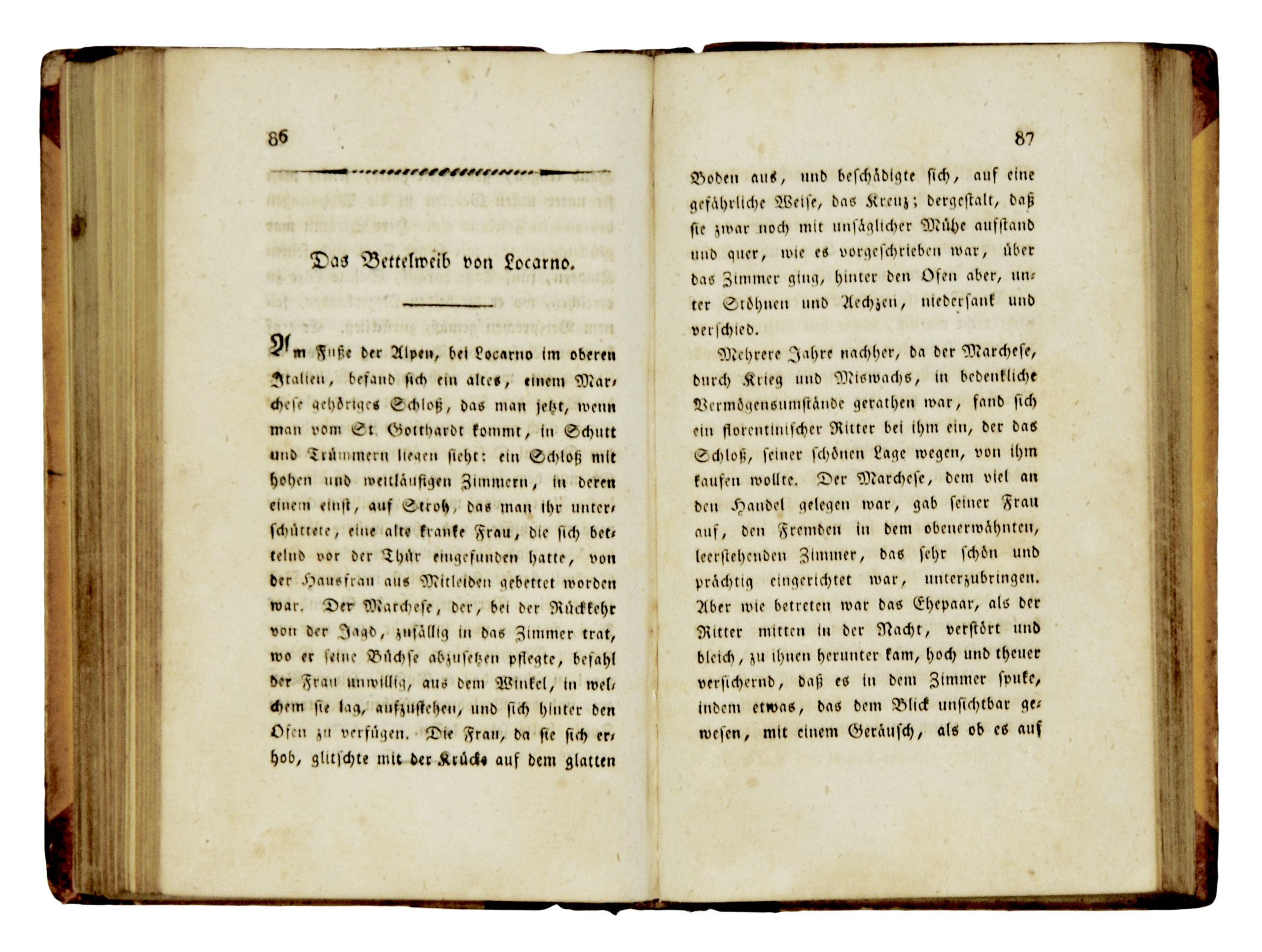 Kleist, Heinrich von: Das Bettelweib von Locarno. In: Heinrich von Kleist: Erzählungen. Zweiter Theil. Berlin, in der Realschulbuchhandlung 1811.